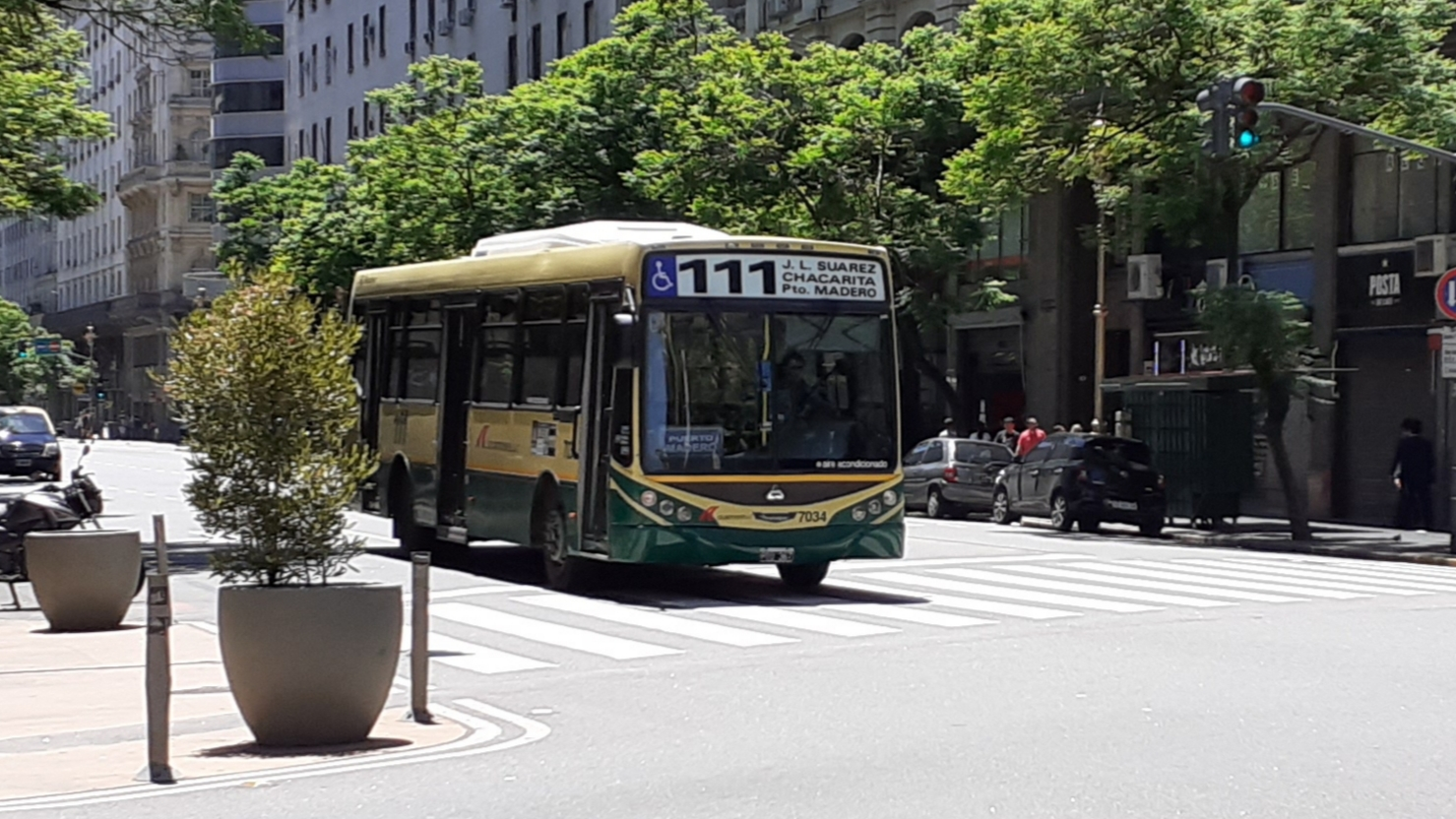 Línea 111 de Colectivos